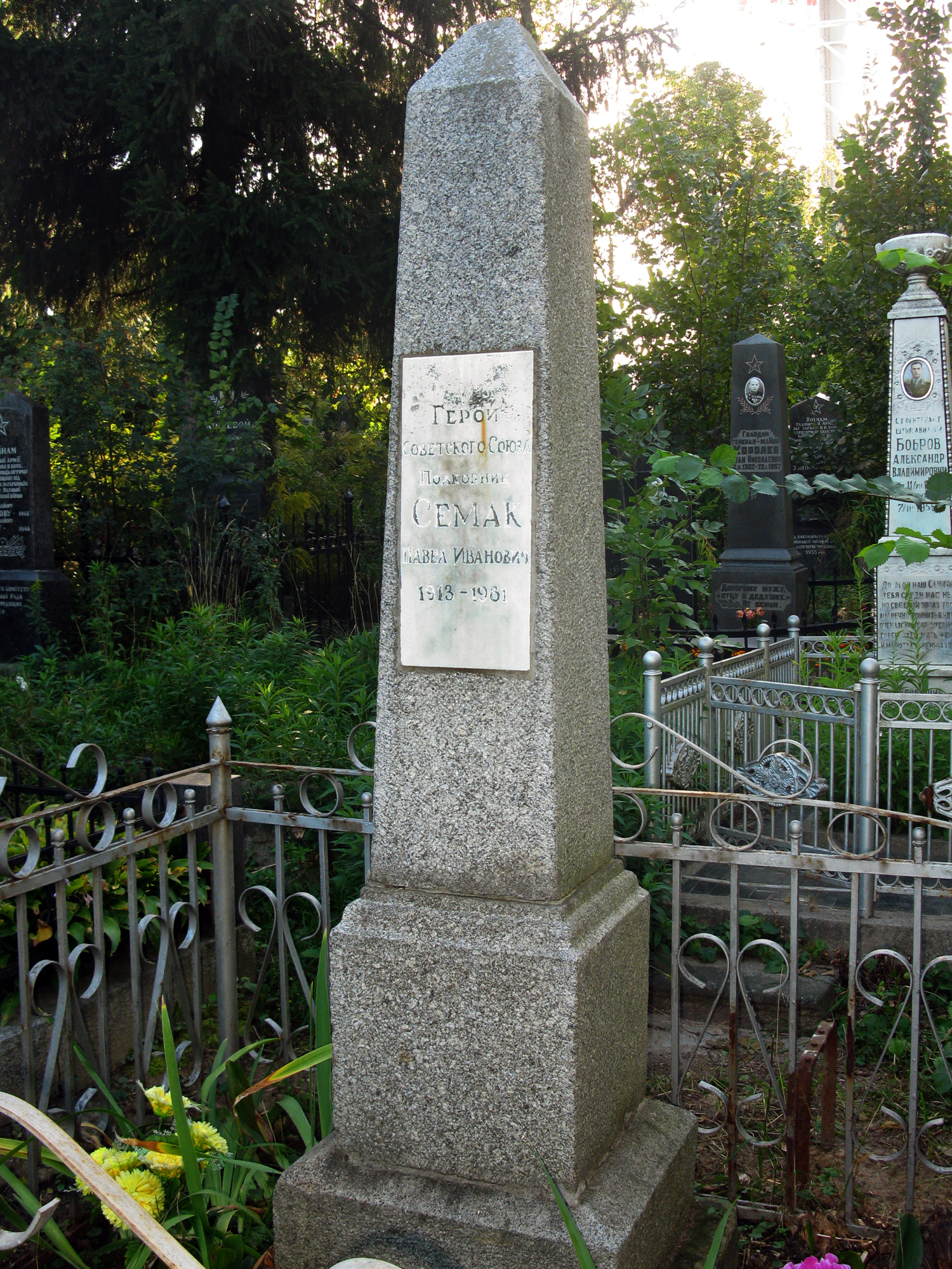 Могила полковника, Героя Радянського Союзу Семака П.І. 1913-1961рр.